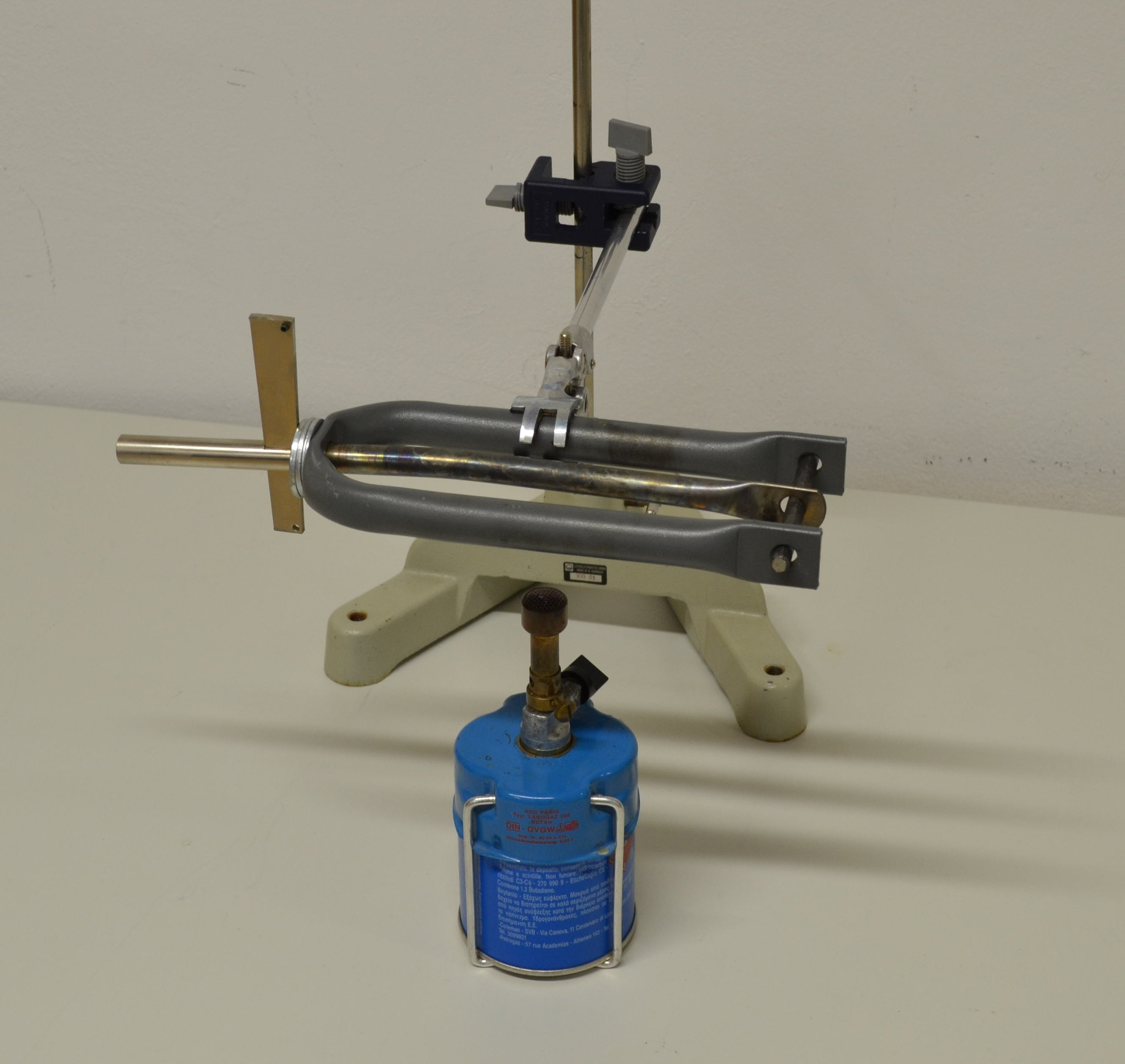 BolzensprengerEsperanto: Stiftorompilo por montri dilaton termikan